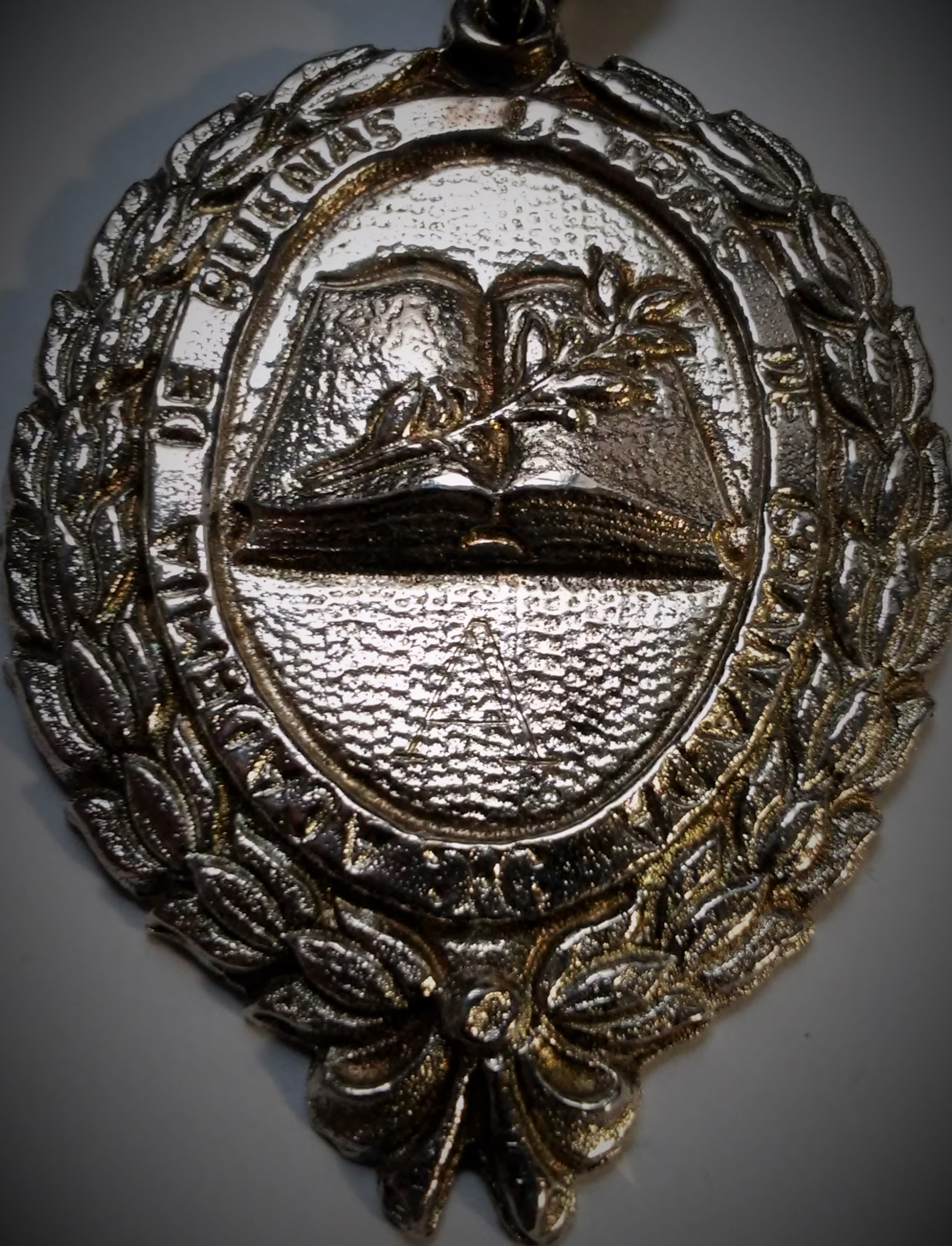 Medalla de la Academia de Buenas Letras de Granada con el símbolo de una rama de mirto alhambreño sobre un libro abierto